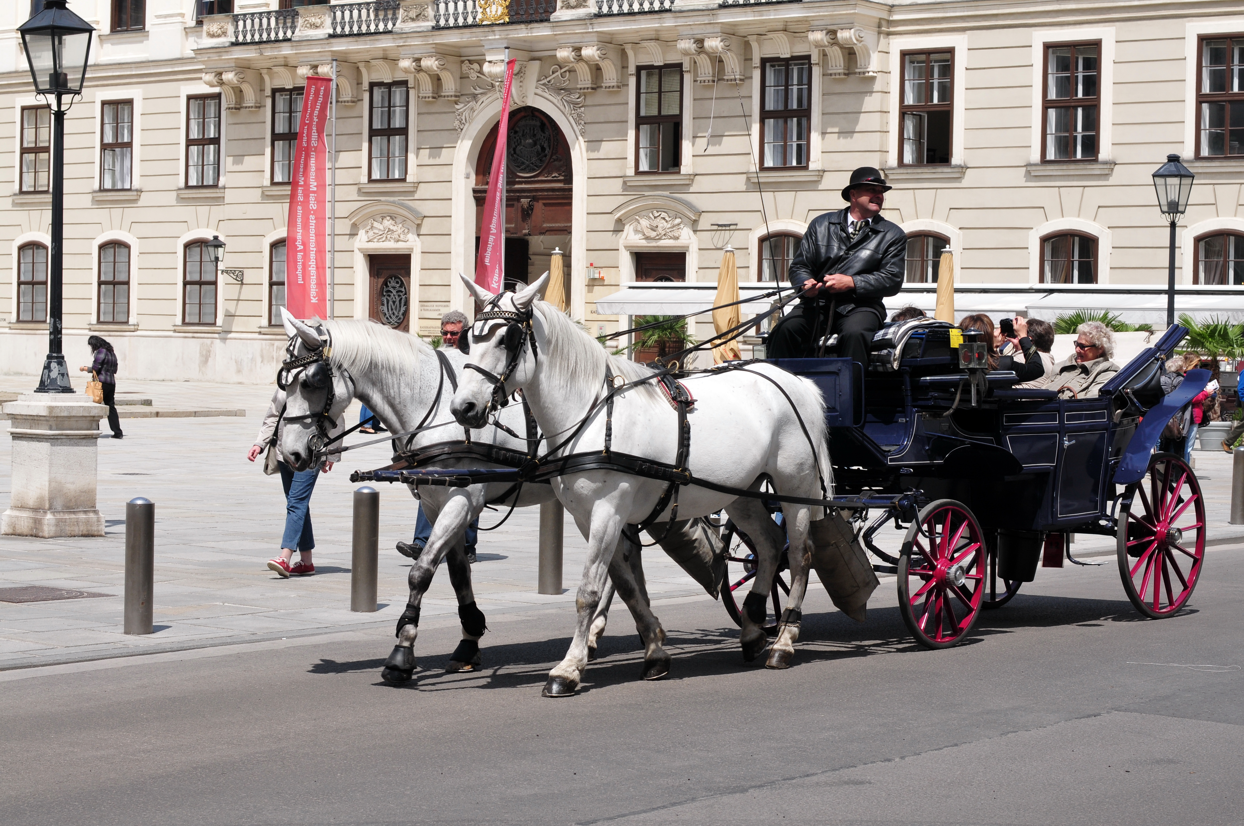 Wien